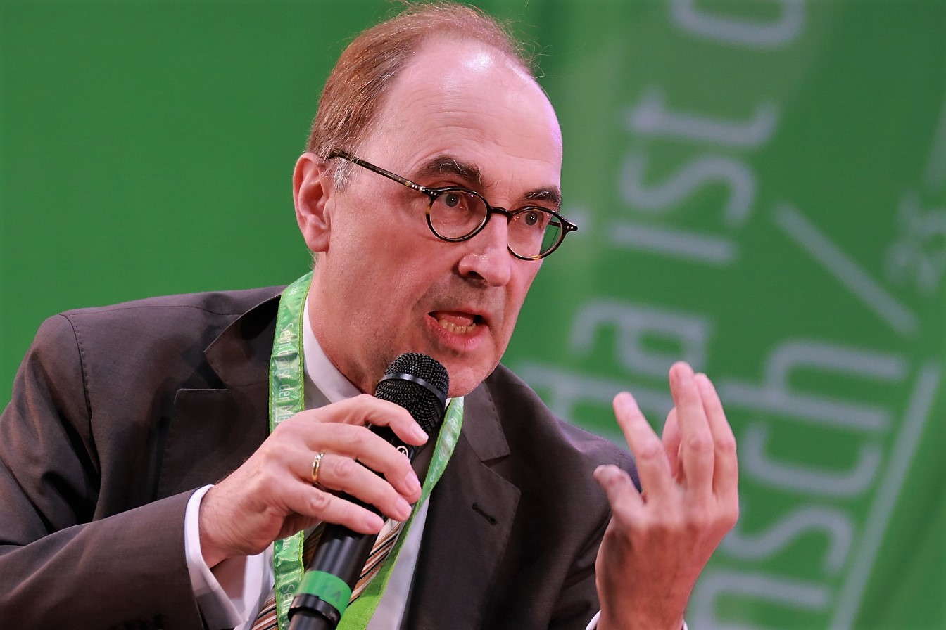 Gernot Lehr auf dem 100. Deutschen Katholikentag